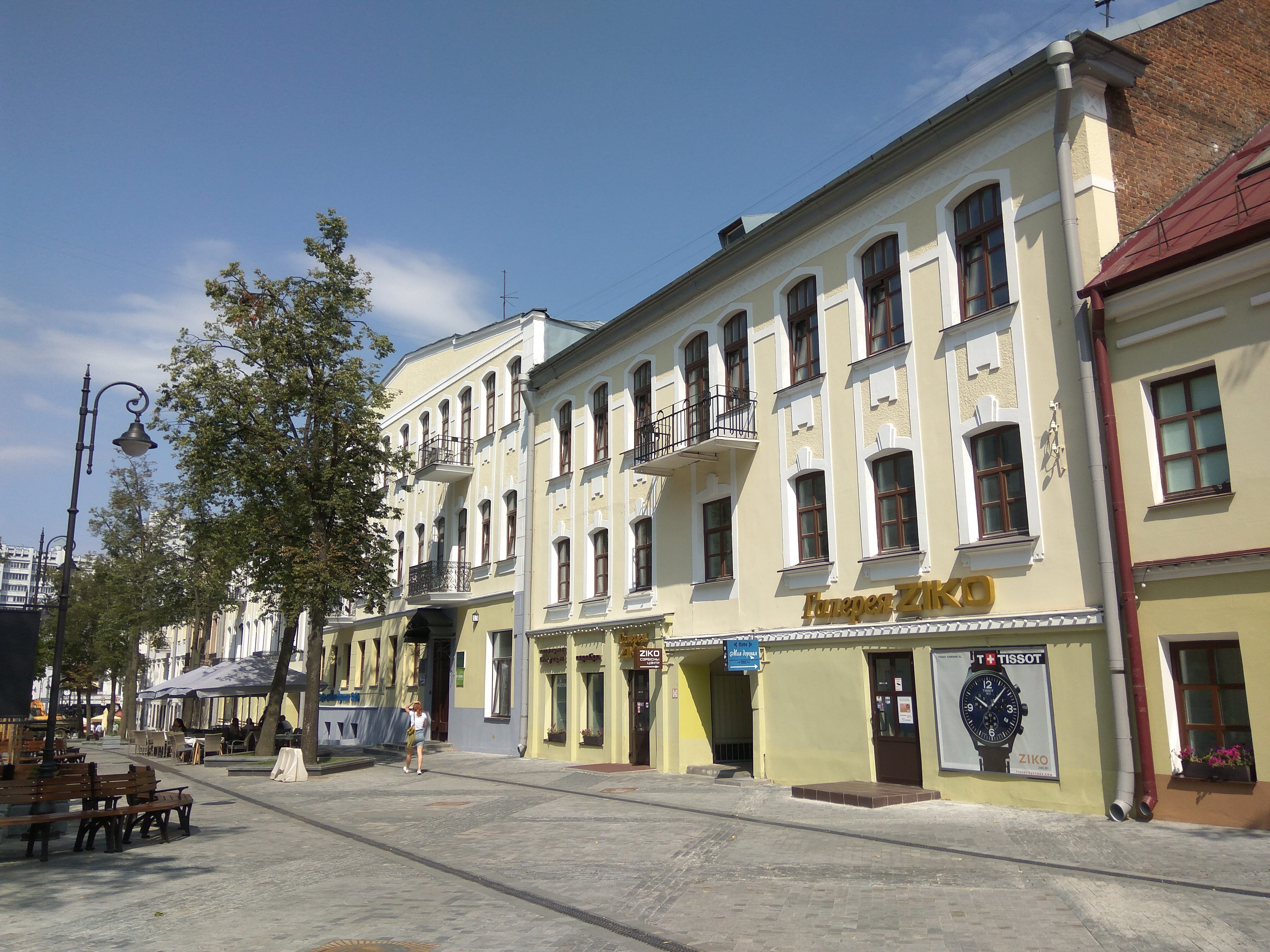 Мінск. Пешаходная Камсамольская (жнівень 2018)